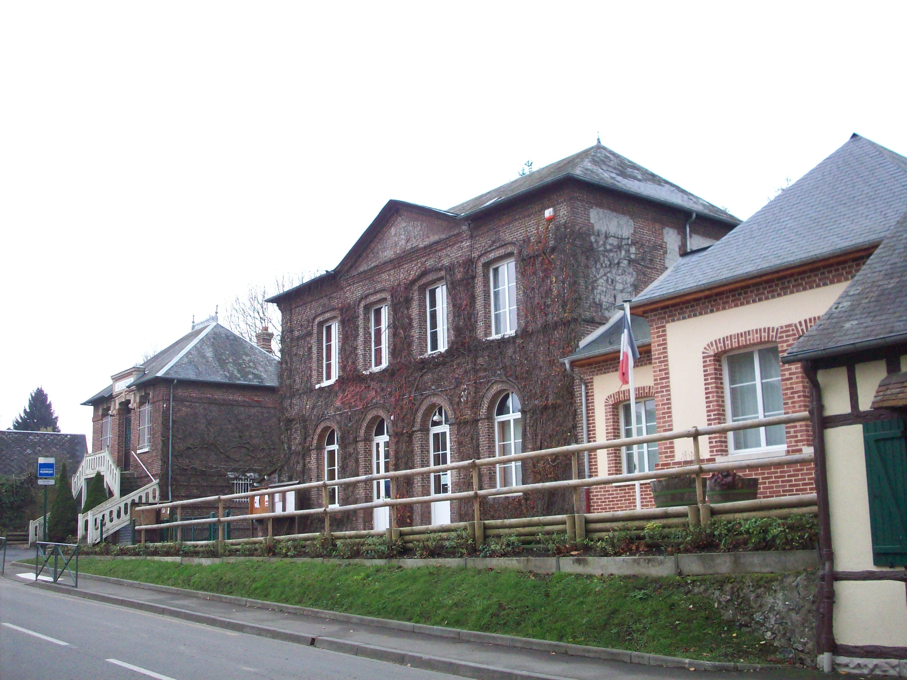 Mairie de Nolléval.